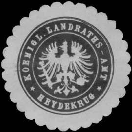 Sealing stamp Title: K. Landraths-Amt Heydekrug Description: schwarz, weiß, geprägt Place: Heydekrug size: cm